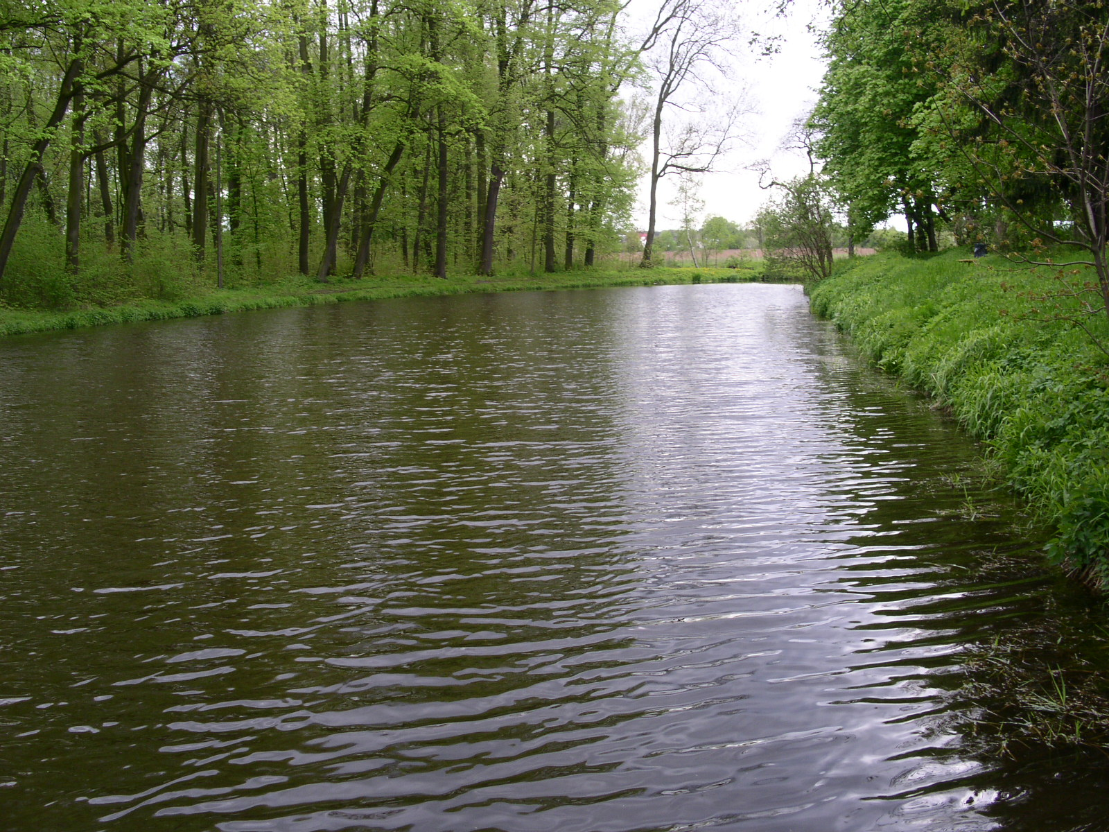 Jezioro na terenie ośrodka terapeutycznego.